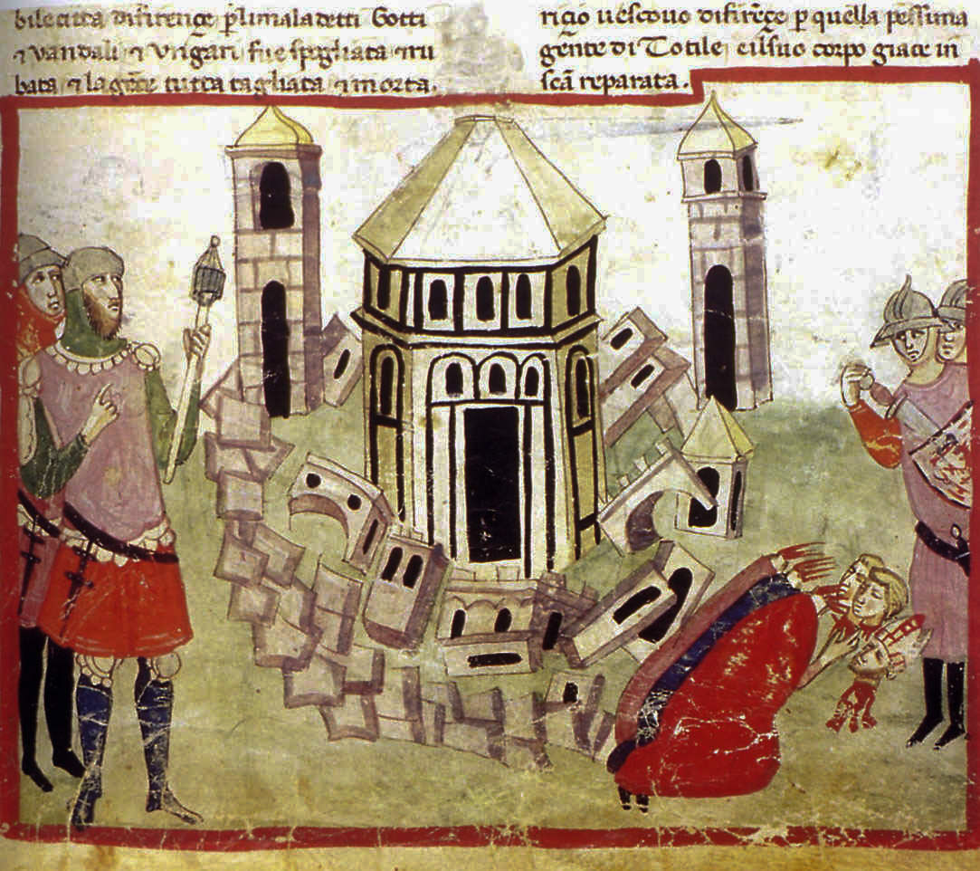 Totila fa distruggere la città di Firenze, ms. Chigiano L VIII 296 della Biblioteca Vaticana, f.36r (1.III,1) Stětí blahoslaveného Maurutia, biskupa fiesolského a zničení města Attilou